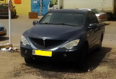 סאניונג